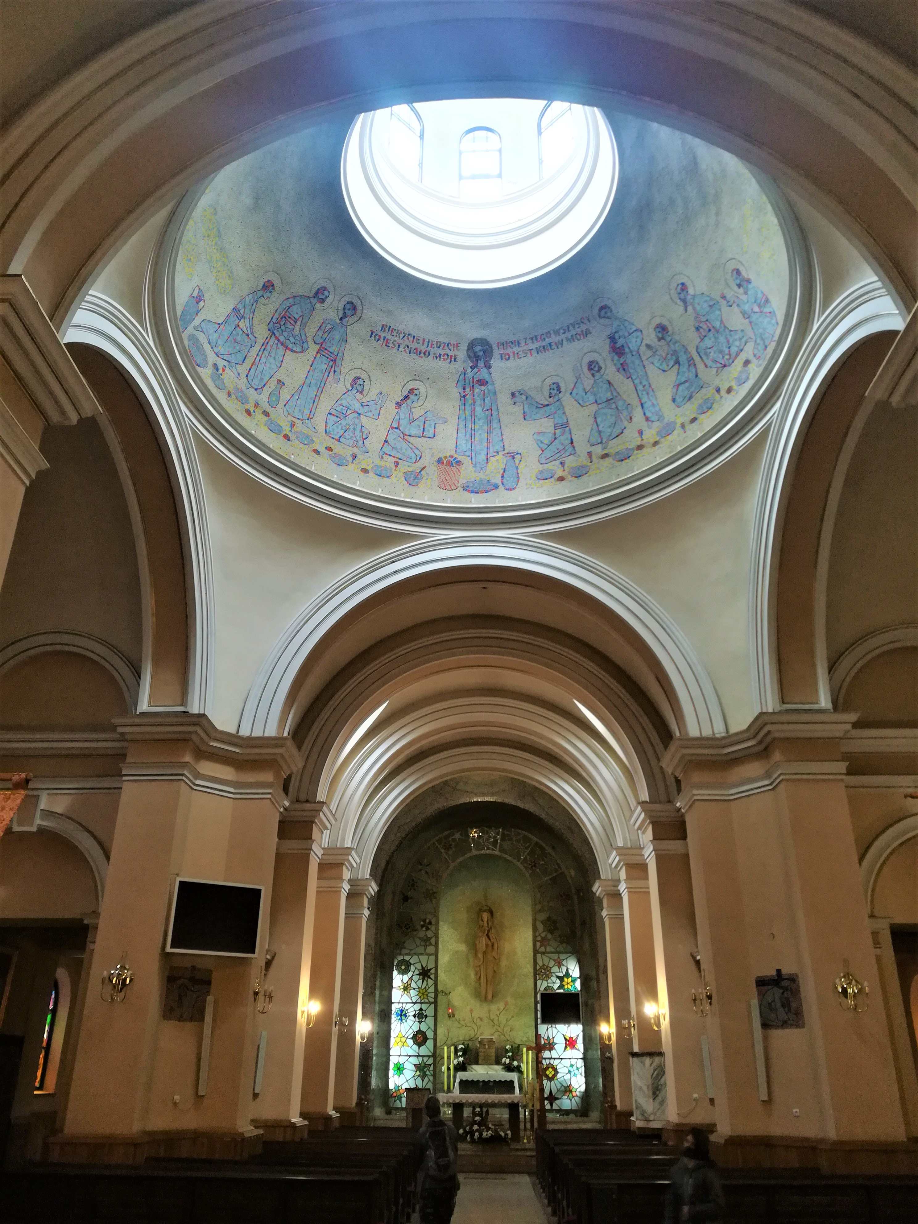 Kościół Wniebowzięcia w Krynicy-Zdr.